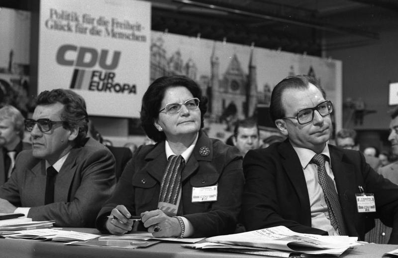 26. Bundesparteitag der CDU in der Friedrich-Ebert-Halle in Ludwigshafen 23.-25.10.1978